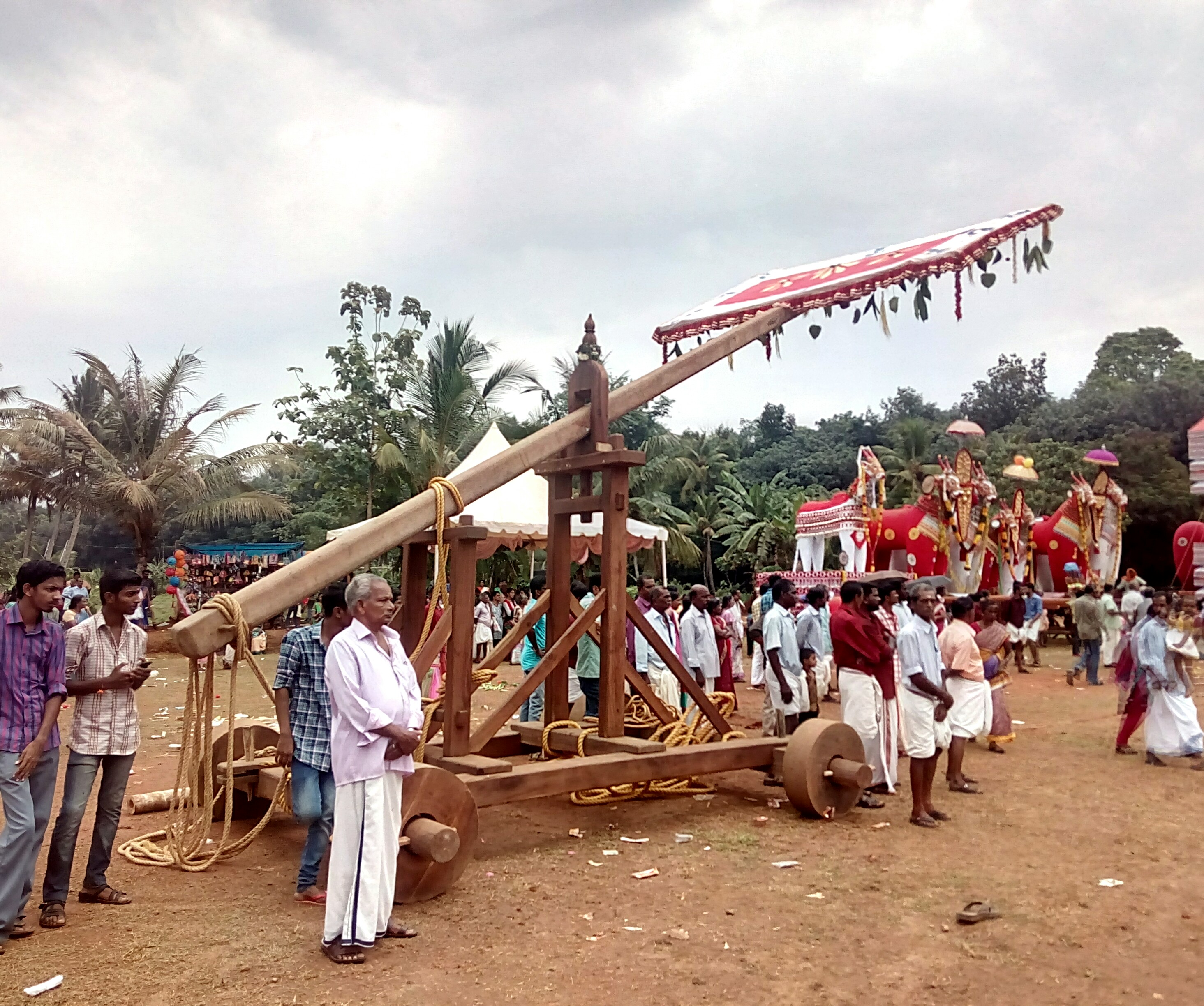 Garudan Thookam Frame